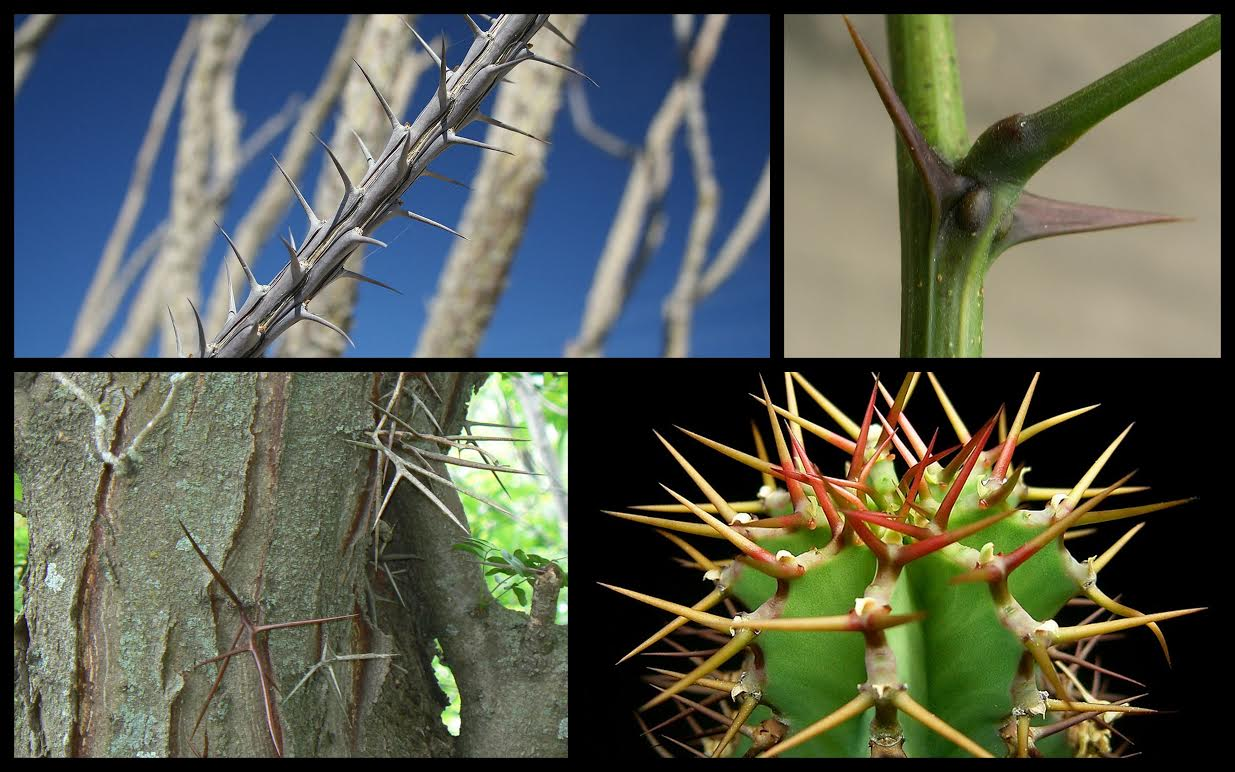 diverses épines